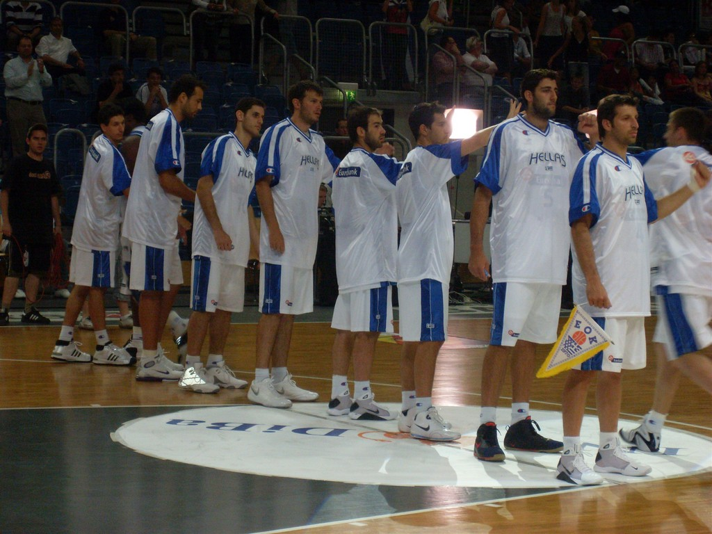 Griechische Basketballnationalmannschaft im Juli 2008